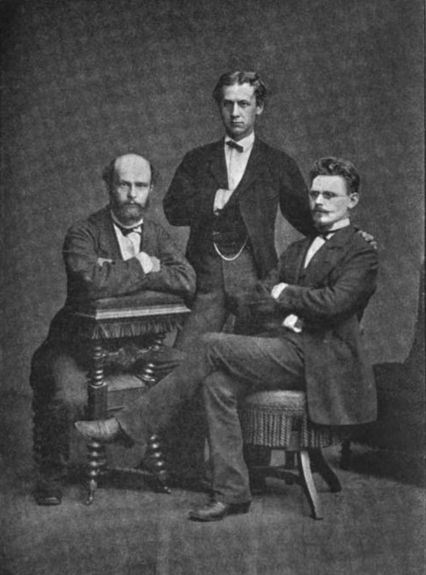 Karl Verner (1846–1896), Valdemar Steffensen & Julius Hoffory (1855–1897)